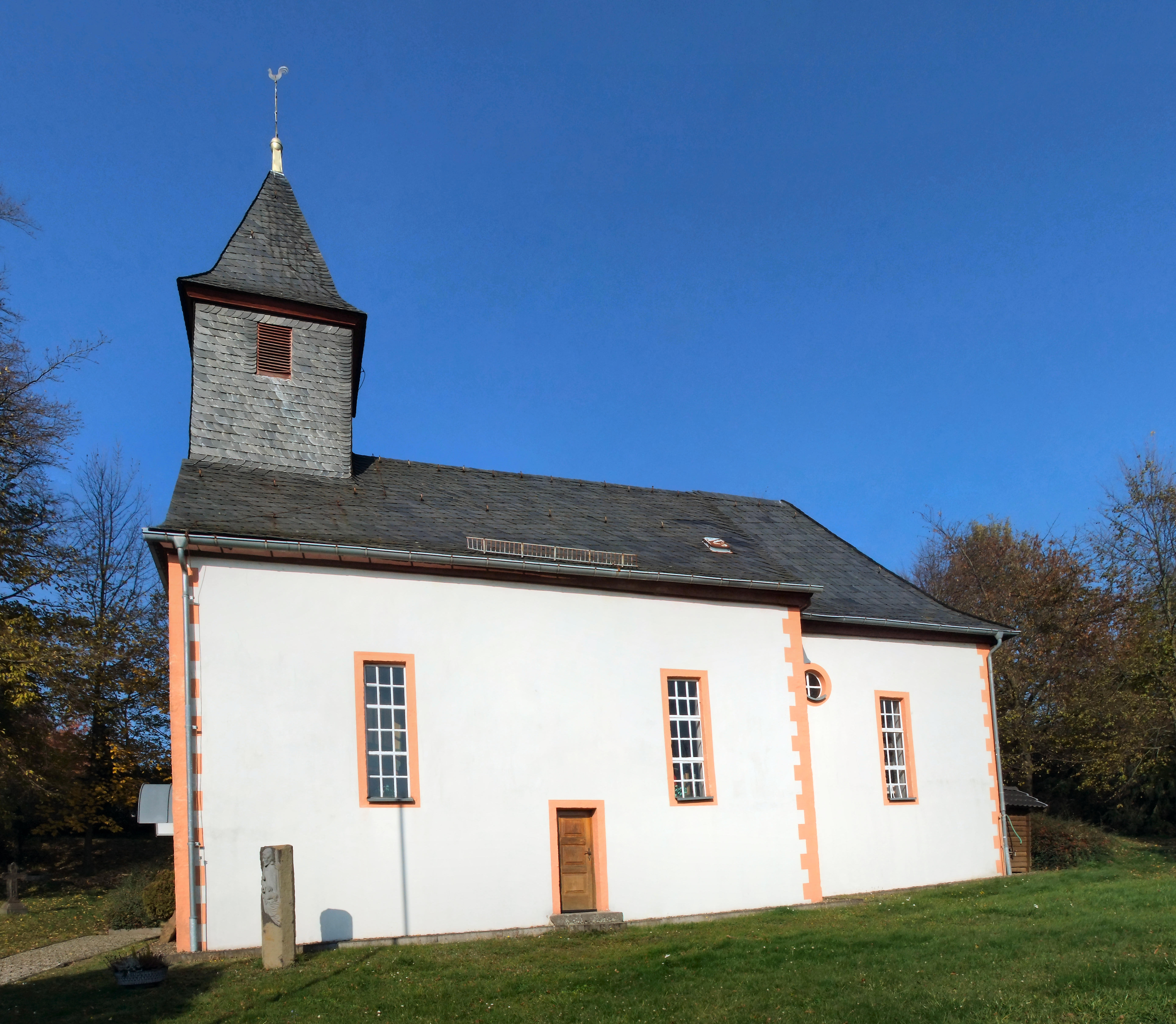 Evangelische Kirche in Harbach, Gemeinde Grünberg, Landkreis Gießen, Hessen, Deutschland